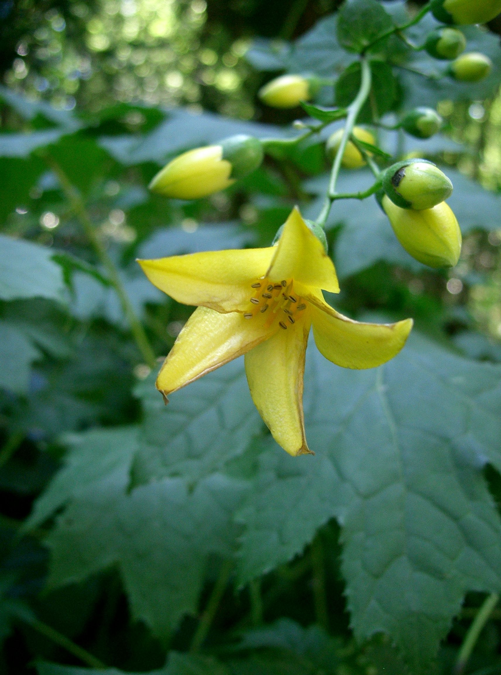 Kirengeshoma palmata